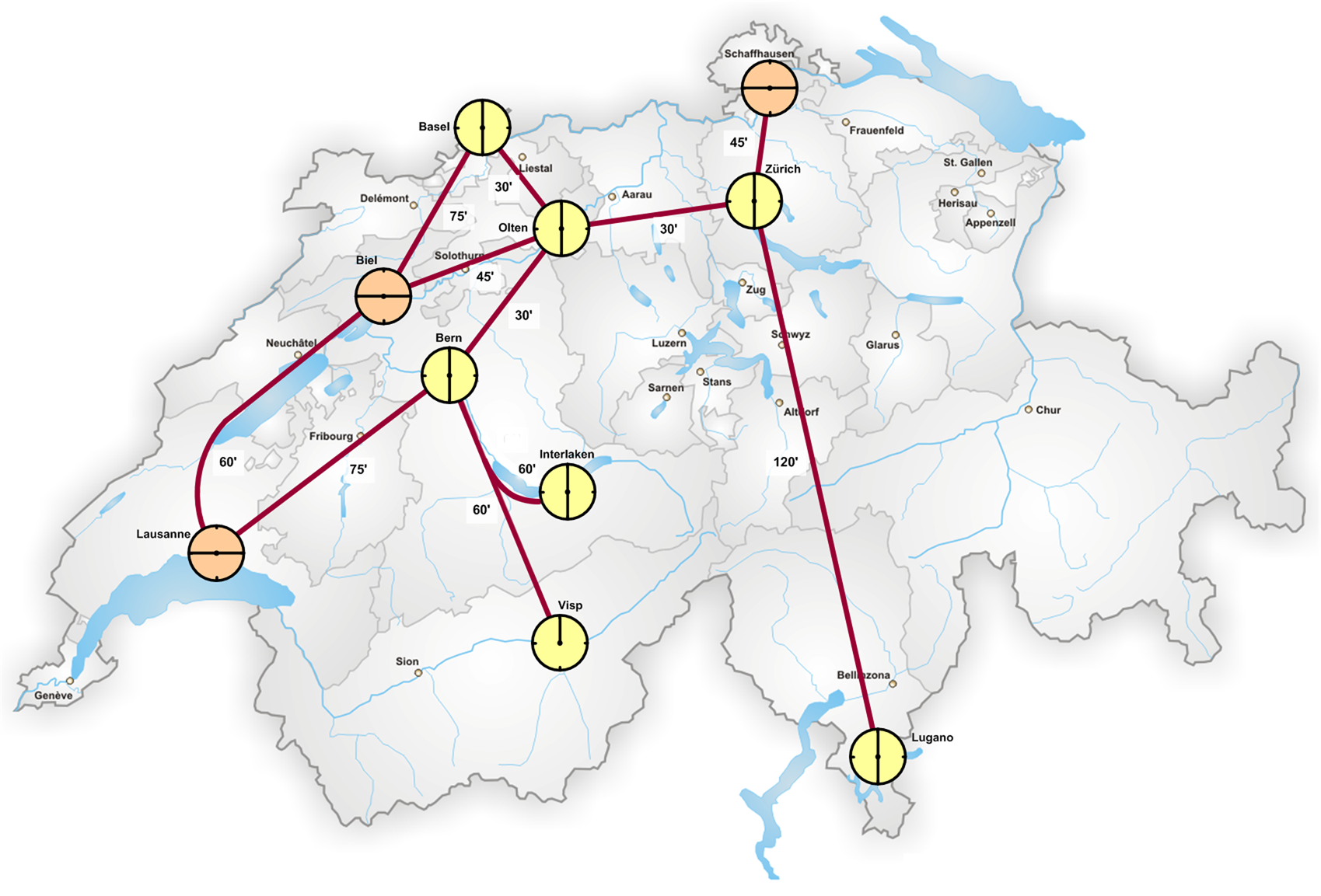 Knotensystem der Schweiz mit Gotthard- und Ceneri-Basistunnel (2019)